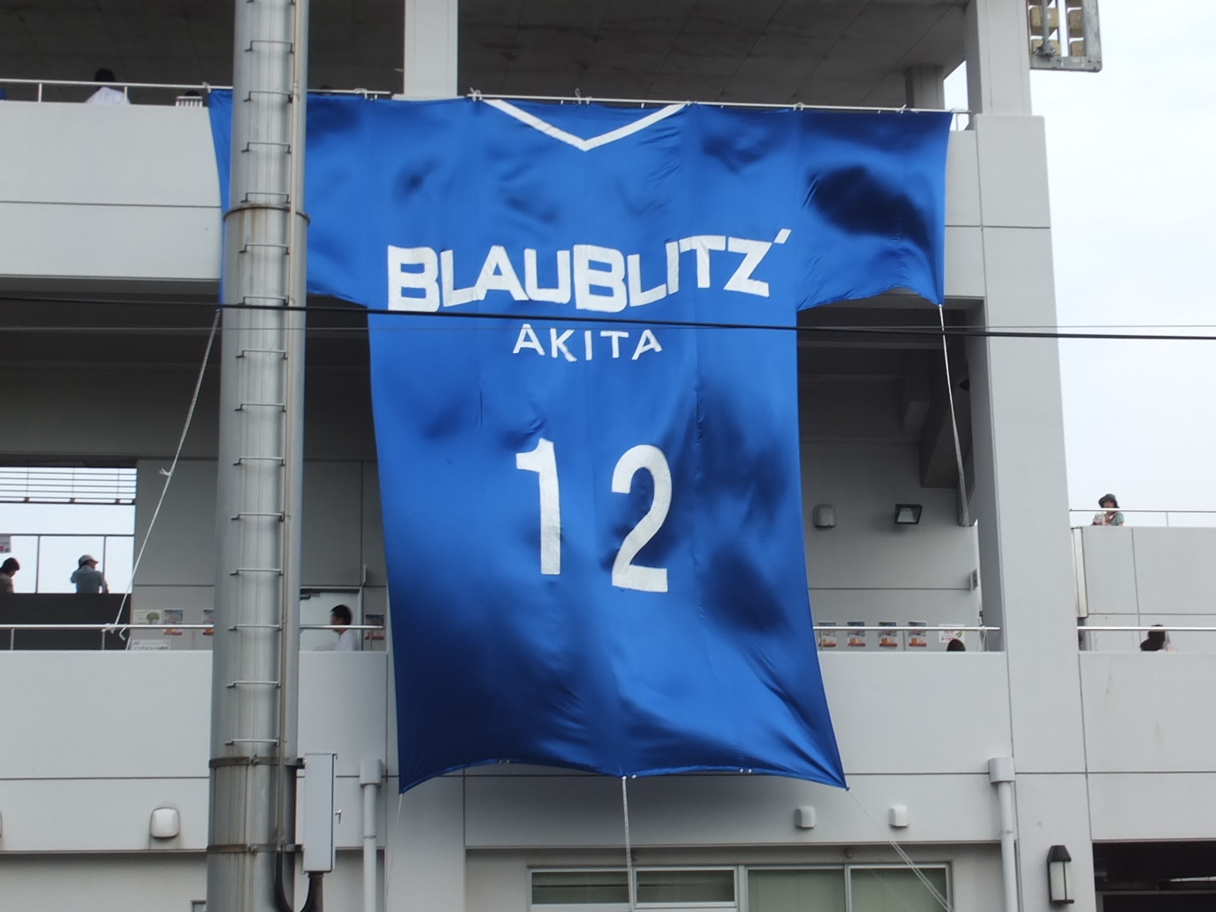 ブラウブリッツ秋田のビッグTシャツ。2013年8月17日、秋田市八橋運動公園球技場にて。